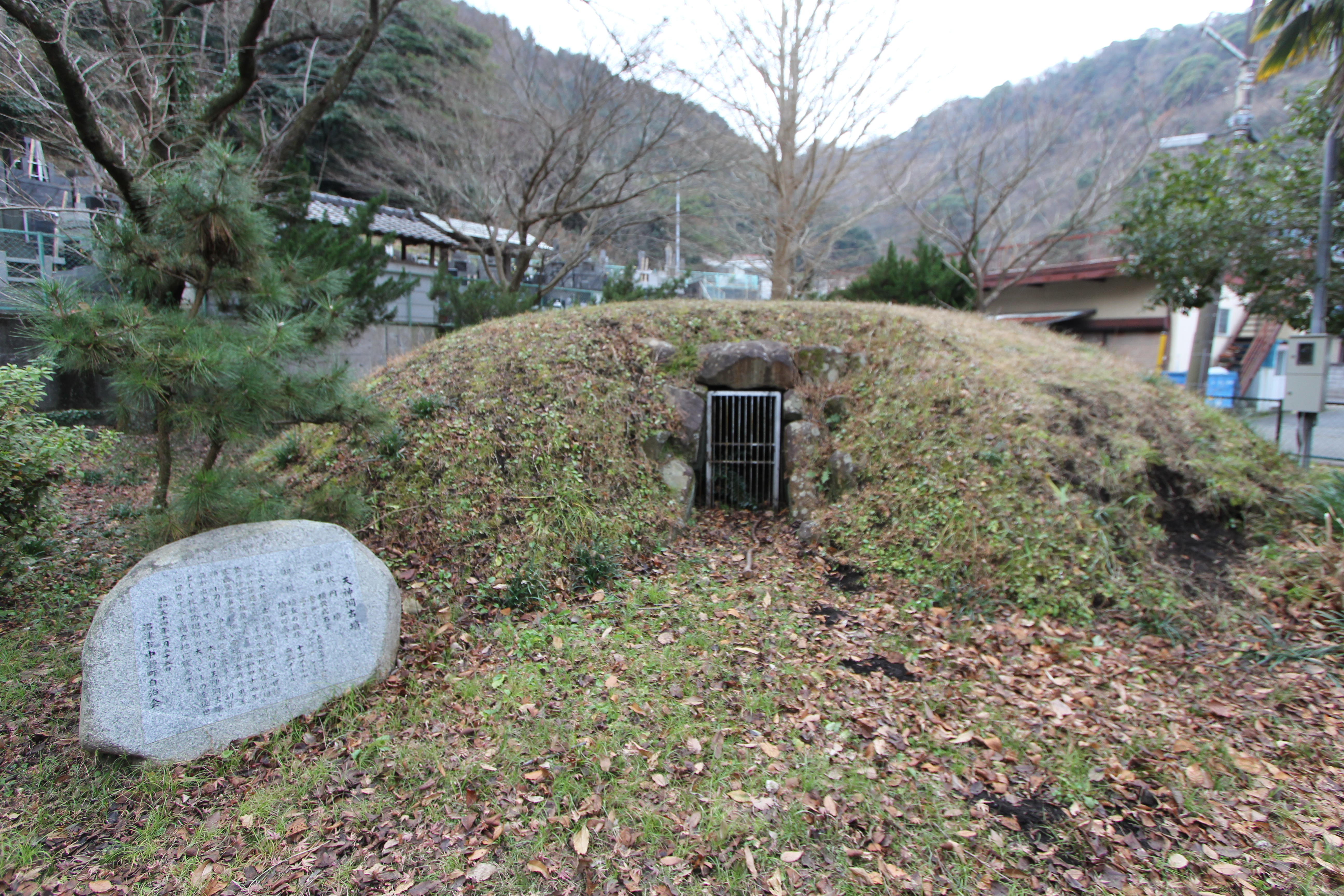 天神洞古墳（沼津市） 全景 レプリカ